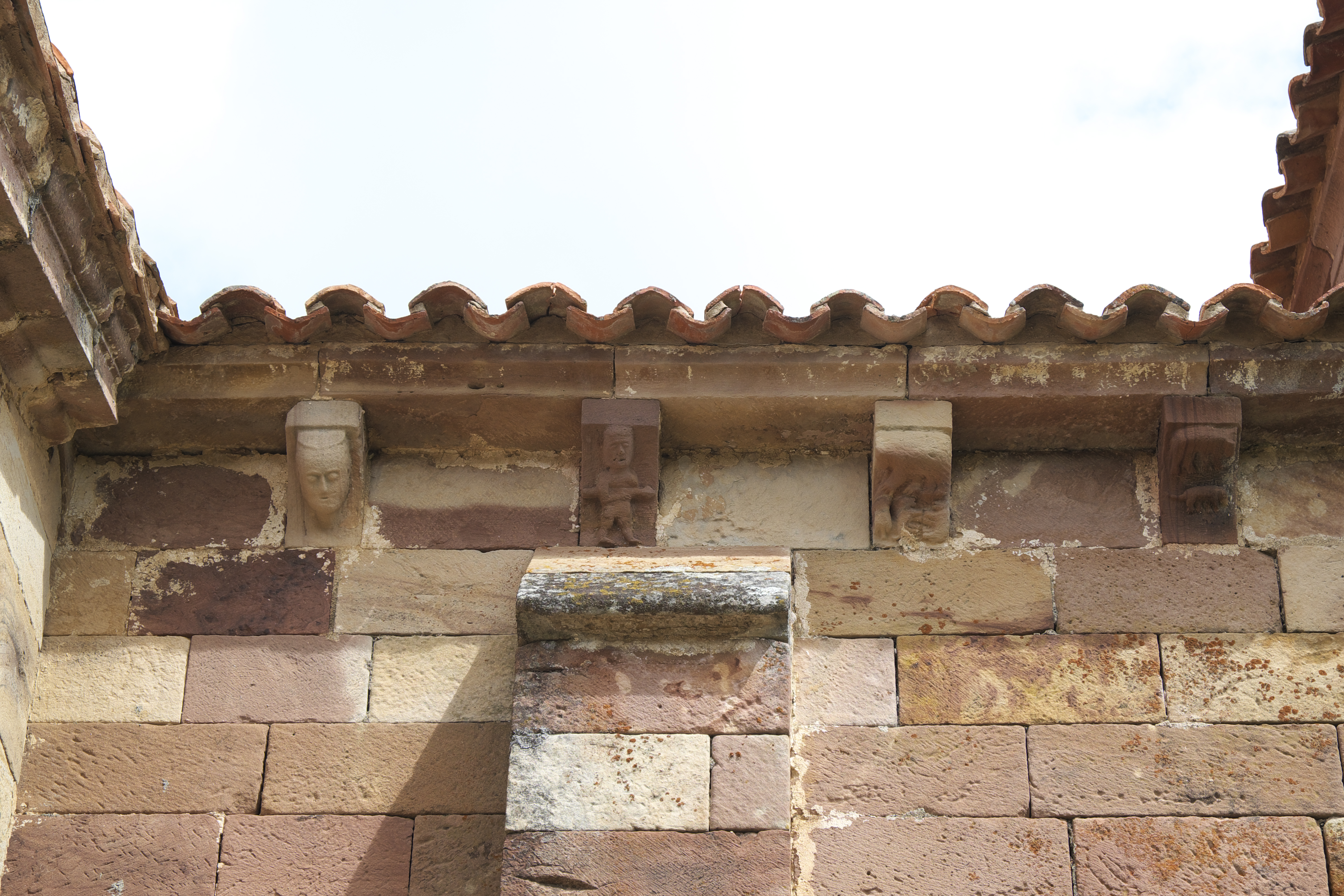 Kirche San Cornelio y San Cipriano in San Cebrián de Mudá in der Provinz Palencia (Kastilien-León/Spanien), Kragsteine